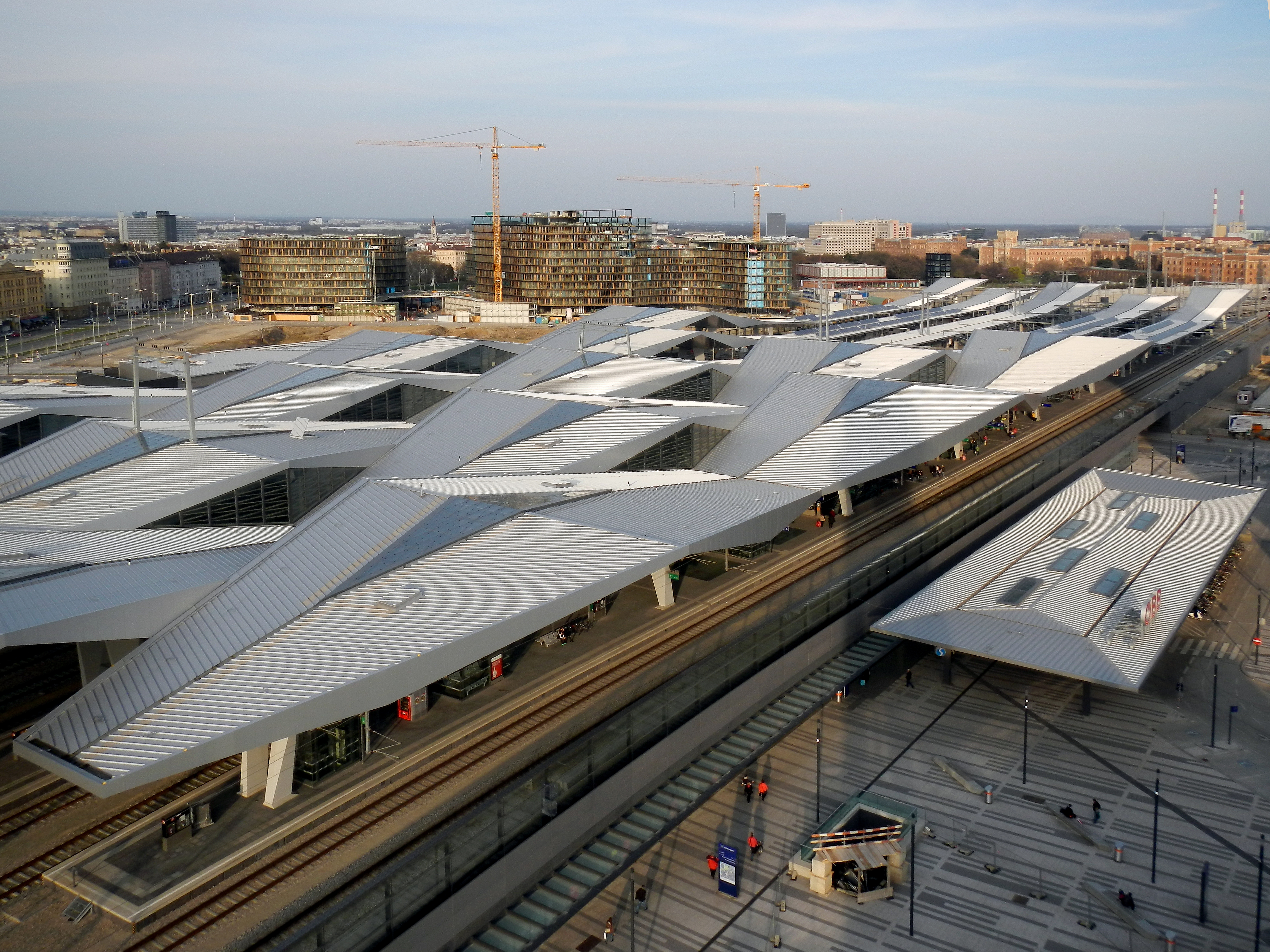 Wien Hauptbahnhof, Blick vom Aussichtsturm Bahnorama Ri Osten